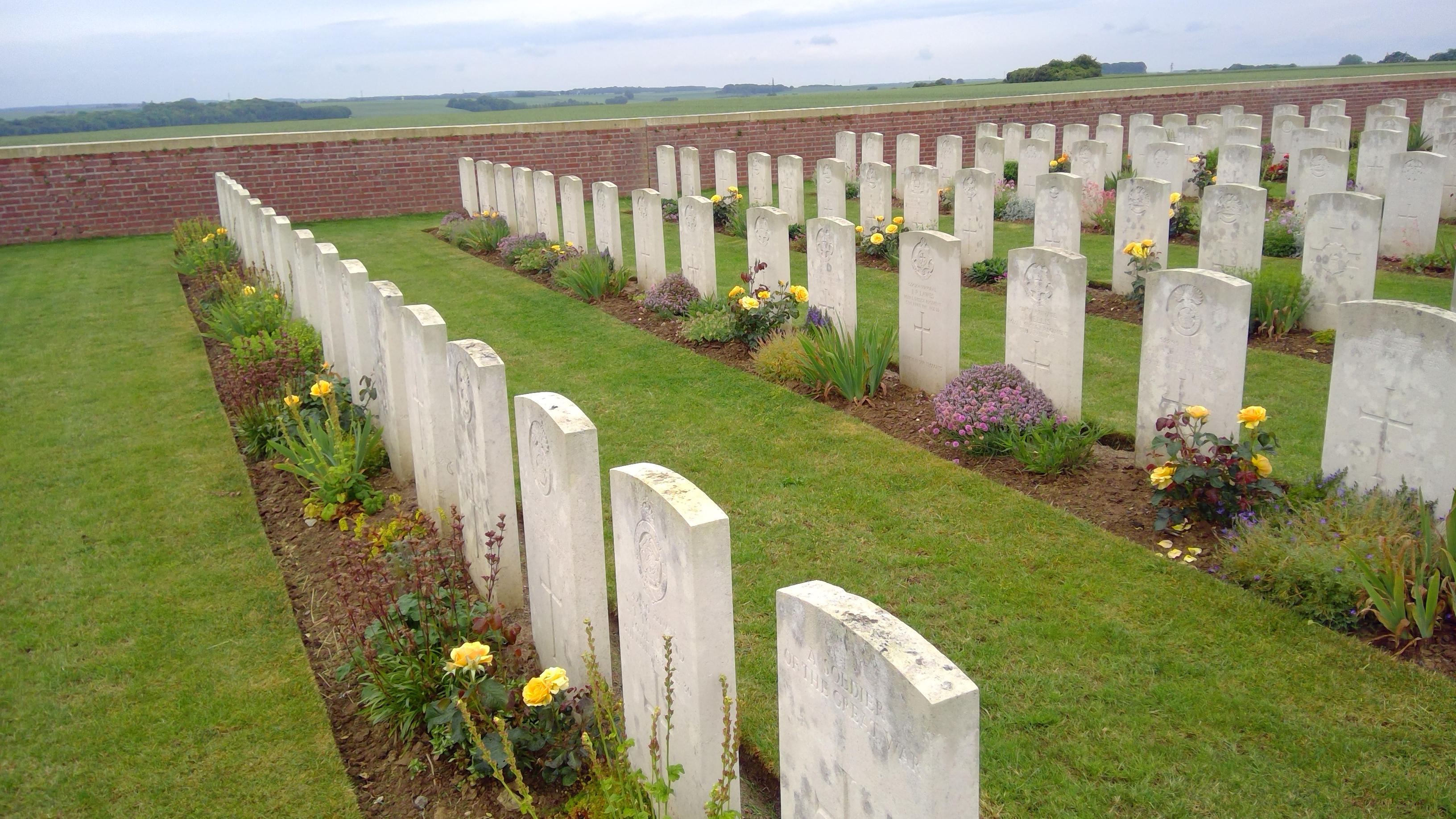 rhai o'r 600 o gerrig beddi'r milwyr yn Bouzincourt Ridge